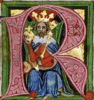 Iniciála R s králem Václavem II. v majestátu